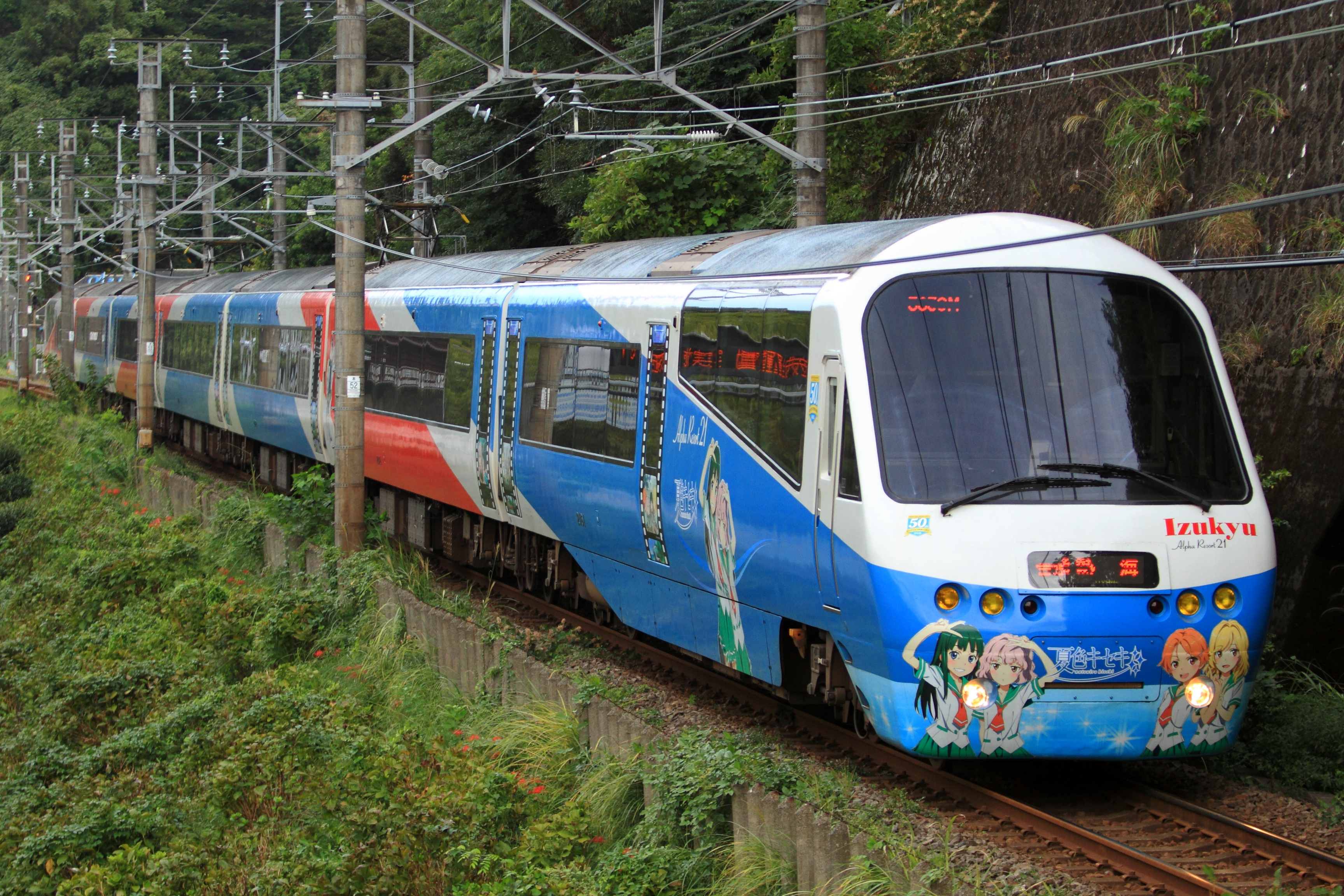 伊豆急2100系R-5編成に施されたラッピング